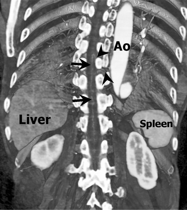 Adamkiewics arterinin koronal bilgisayarlı tomografi kesitinde spinal kanala girişi (ok başları) ve spinal kord önünde yukarı doğru uzanması ve saç tokası şeklinde kıvrılması sonrası anterior spinal arterin yapısına katılması (oklar) görülmektedir